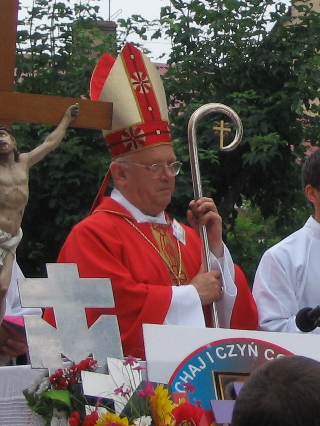 Biskup Józef Zawitkowski, zdjęcie wykonane w Nowy Mieście nad Pilicą w trakcie mszy dla Warszawskie Pieszej Pielgrzymki grup 17-tych